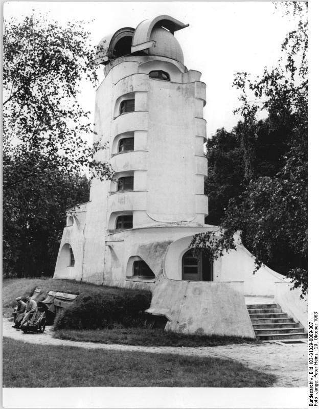 Zentralbild-Junge 29.10.63 Astrophysikalisches Observatorium Potsdam (DDR) Das im Jahre 1874 gegründete Astrophysikalische Observatorium Potsdam, das seit 1945 der Deutschen Akademie der Wissenschaften zu Berlin angegliedert ist, führt Forschungsarbeiten auf dem Gesamtgebiet der Astrophysik durch. Die Sonnenphysik ist das Hauptarbeitsgebiet des Astrophysikalischen Observatoriums Potsdam: Dieser Forschung dienen das im Jahre 1922 errichtete Turmteleskop und mehrere Spezialgeräte zur Beobachtung der Sonnenaktivität. Die Messung der solaren Radiostrahlung erfolgt an einer 15 Kilometer südlich von Potsdam gelegenen Beobachtungsstation in Tromsdorf unter Leitung von Dr. H. Daene. Zur Pflege der Sternphysik verfügt das Institut über einen grossen Doppelrefraktor, dessen photographisches Objektiv mit 80 Zentimeter Durchmesser zu den grössten Linsenobjektiven der Welt zählt. Das Astrophysikalische Observatorium Potsdam ist an der weltweiten Zusammenarbeit im Internationalen Geophysikalischen Jahr während des Maxismus der Sonnenaktivität (1957-58) und an den bevorstehenden "Jahren der ruhigen Sonne" durch umfangreiche Arbeitsprogramme beteiligt. UBz. Der Einsteinturm des Astrophysikalischen Observatoriums Potsdam, der mit seinen Beobachtungsinstrumenten, Spektralanlagen und Auswertegeräten speziell sonnenphyikalischen Forschungen dient."